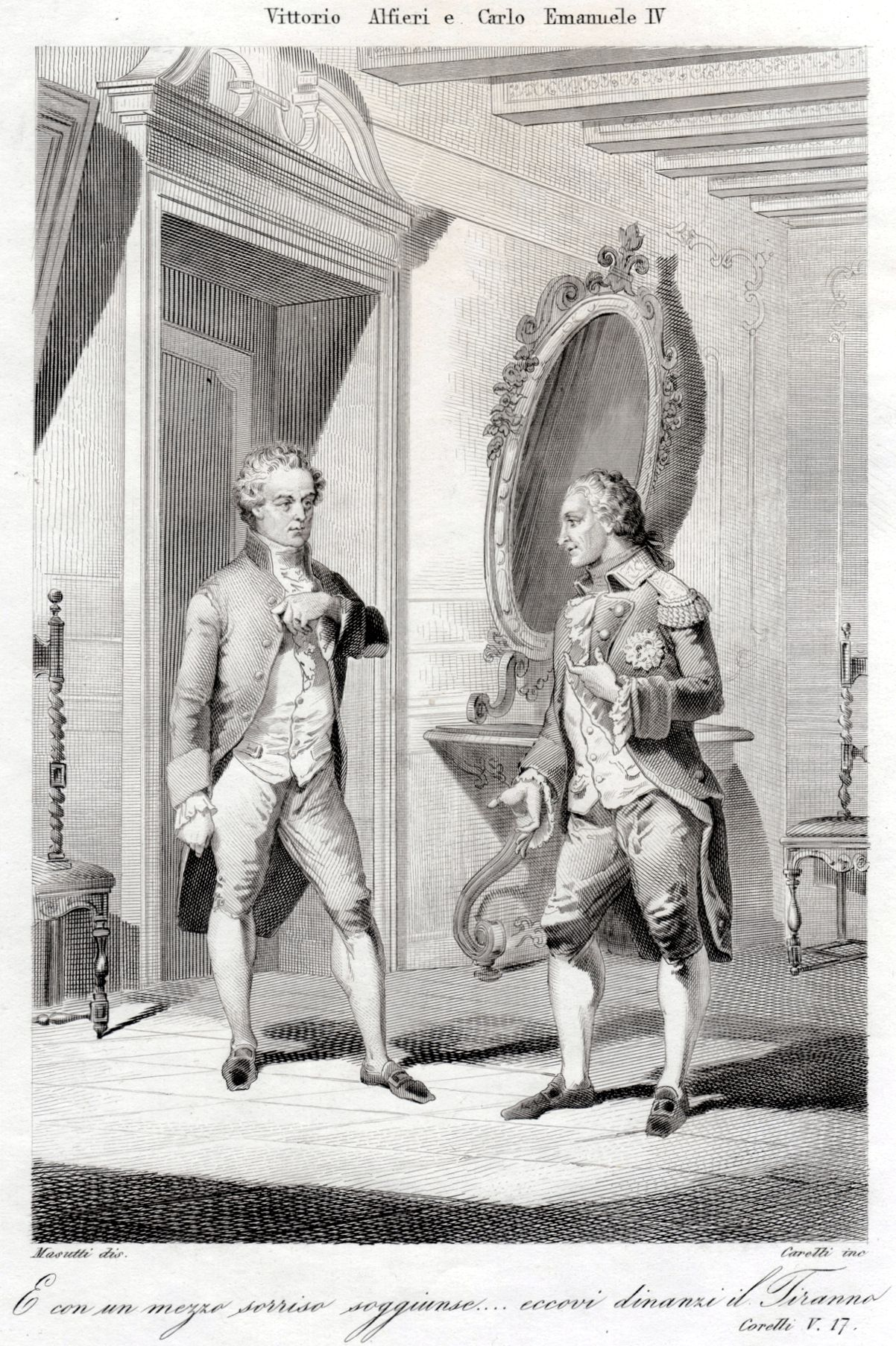 Miniatura dell' inontro tra Vittorio Alfieri e re Carlo Emanuele IV